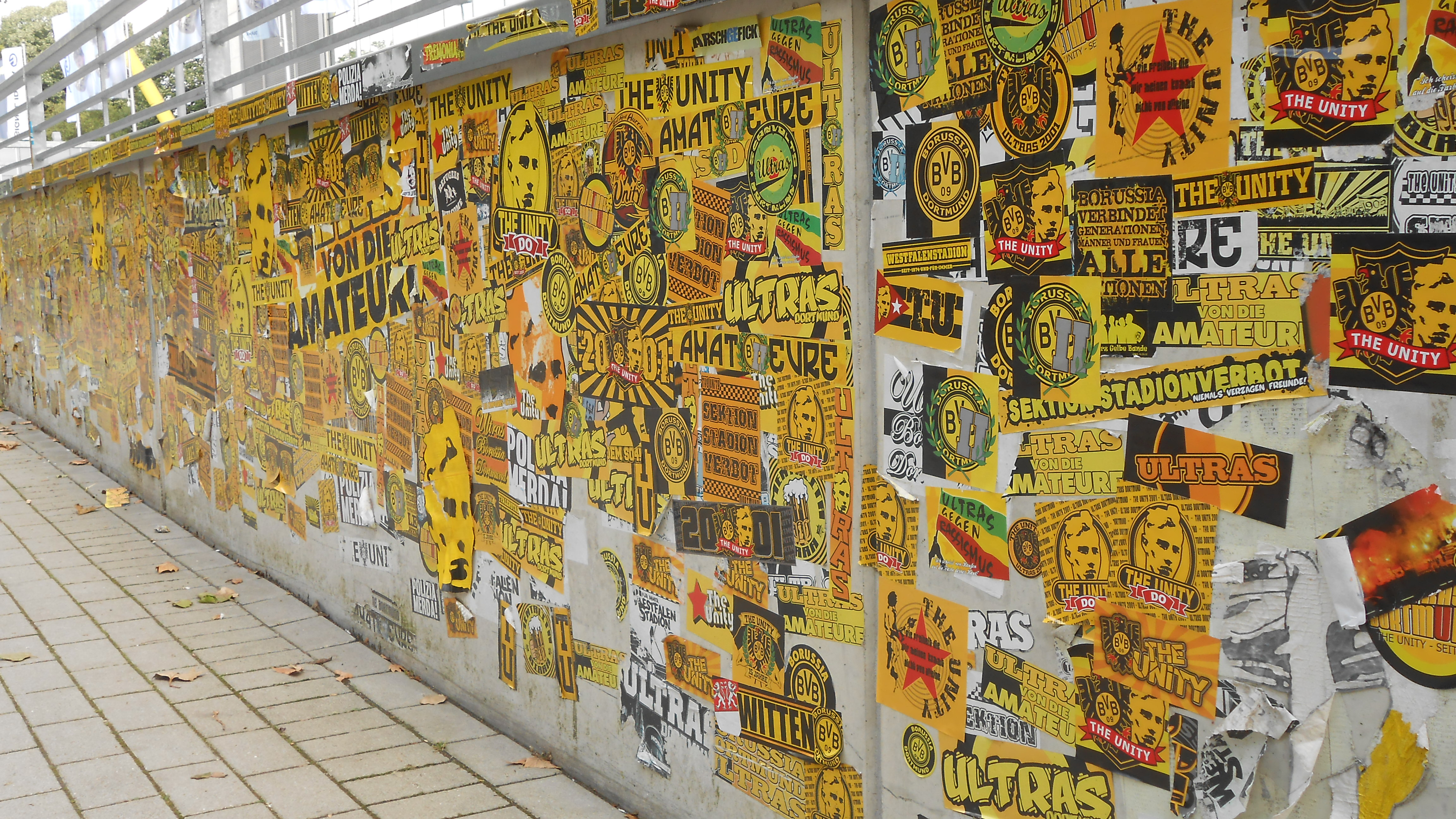 Aufkleber von BVB-Anhängern an der Strobelallee, vor dem Westfalenstadion.